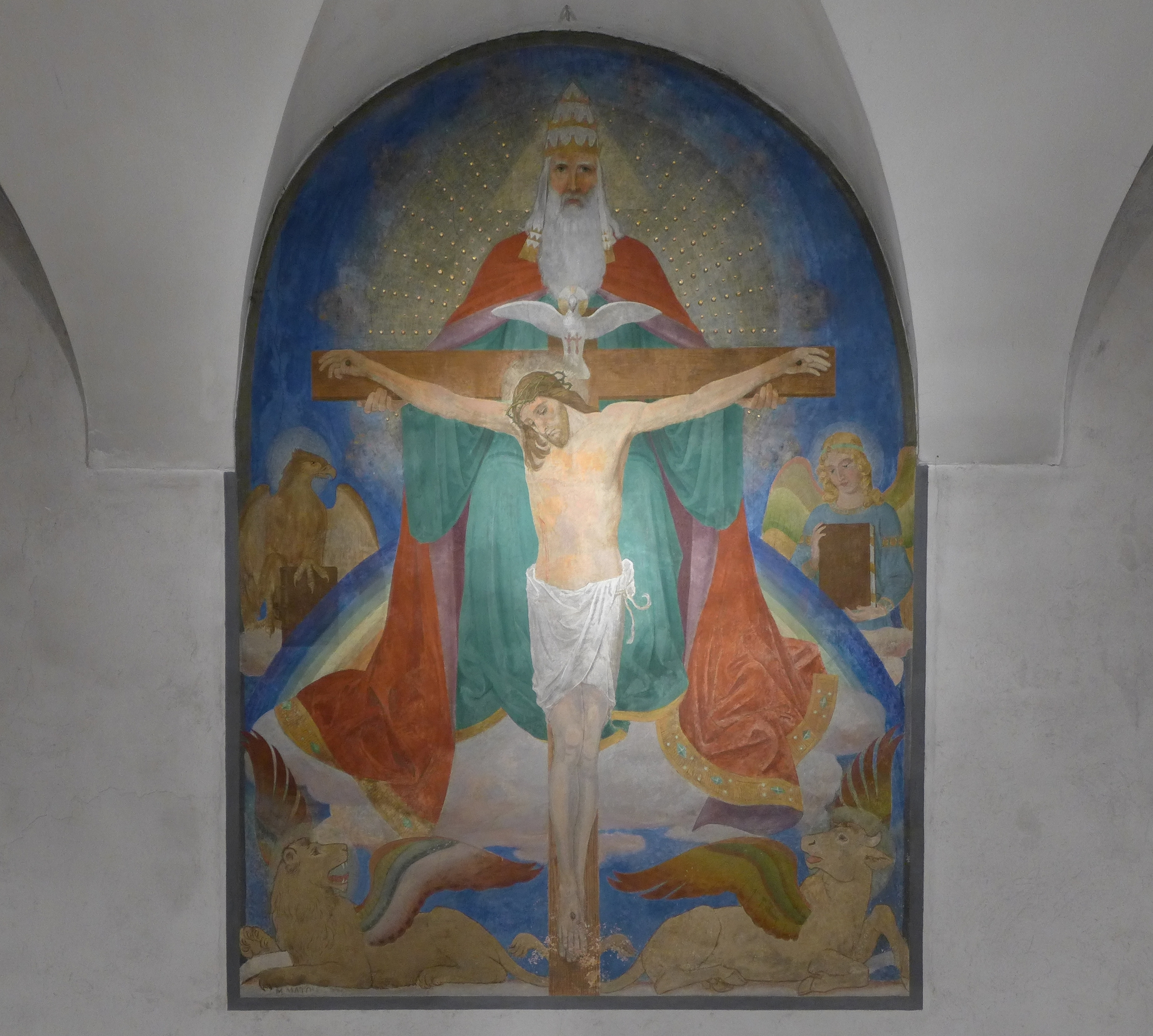 Basilika Seckau, Chorkapelle, Gnadenstuhl (Martin Matousch, 1908)